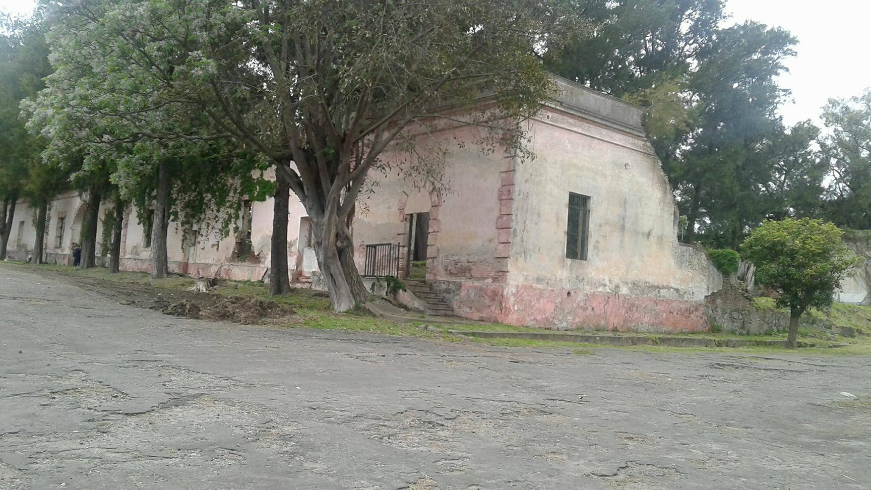 Campamento Educativo Octubre 2017